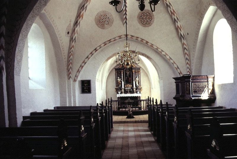 Dalbyover Kirke i Danmark. Skibet set mod øst